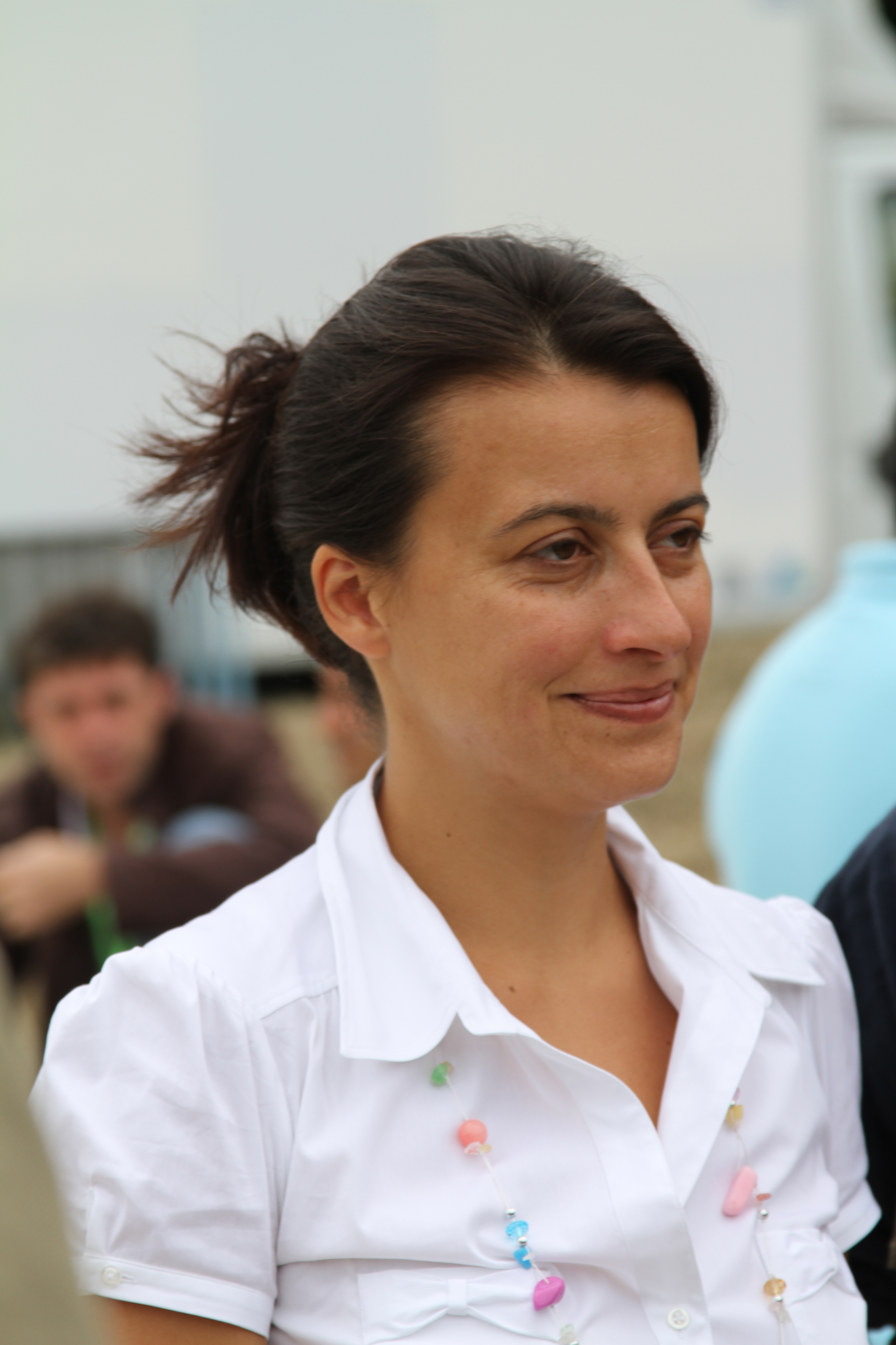 Photo prise lors des journées d'été Europe ecologie les Verts à Nantes